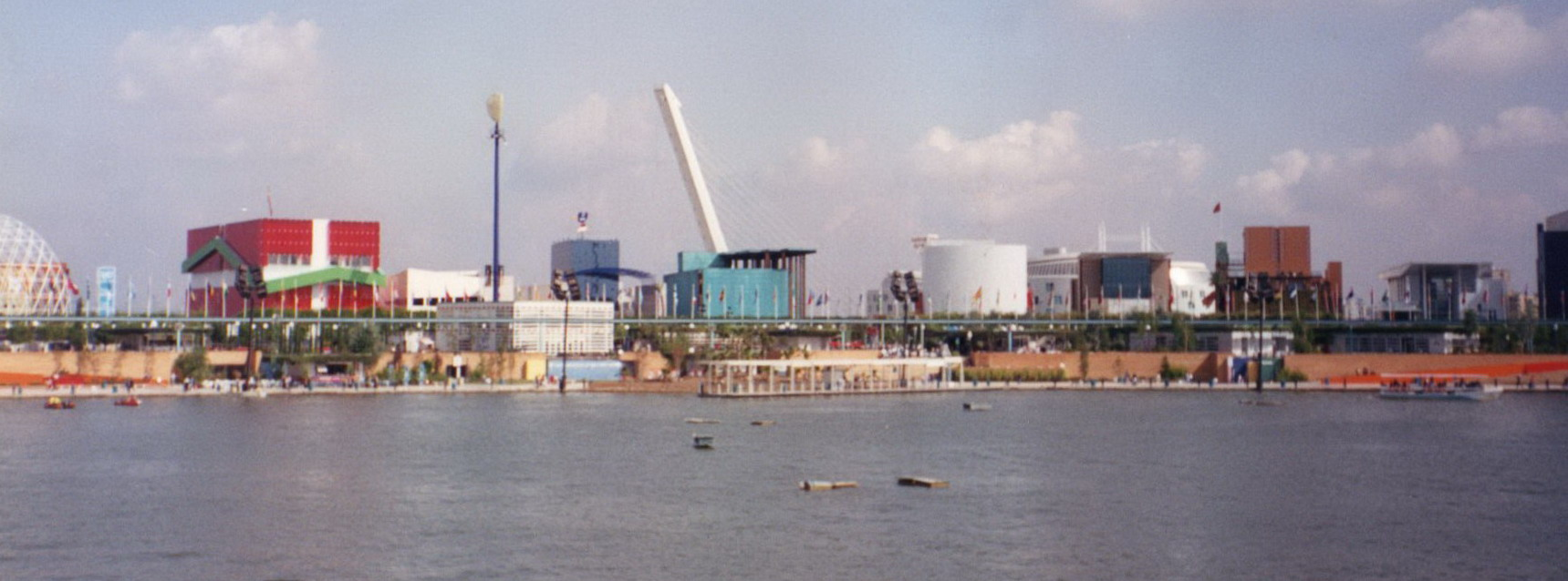 Vista del Lago de Expó´92 con los pabellones autonómicos al fondo.